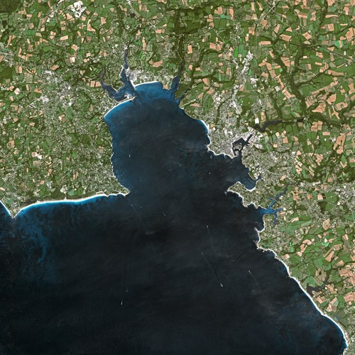 Concarneau by SPOT Satellite (de gauche à droite : la Pointe de Mousterlin, Beg Meil, la Baie de la Forêt (Cap Coz, La Forêt-Fouesnant, Port-la-Forêt), Concarneau)